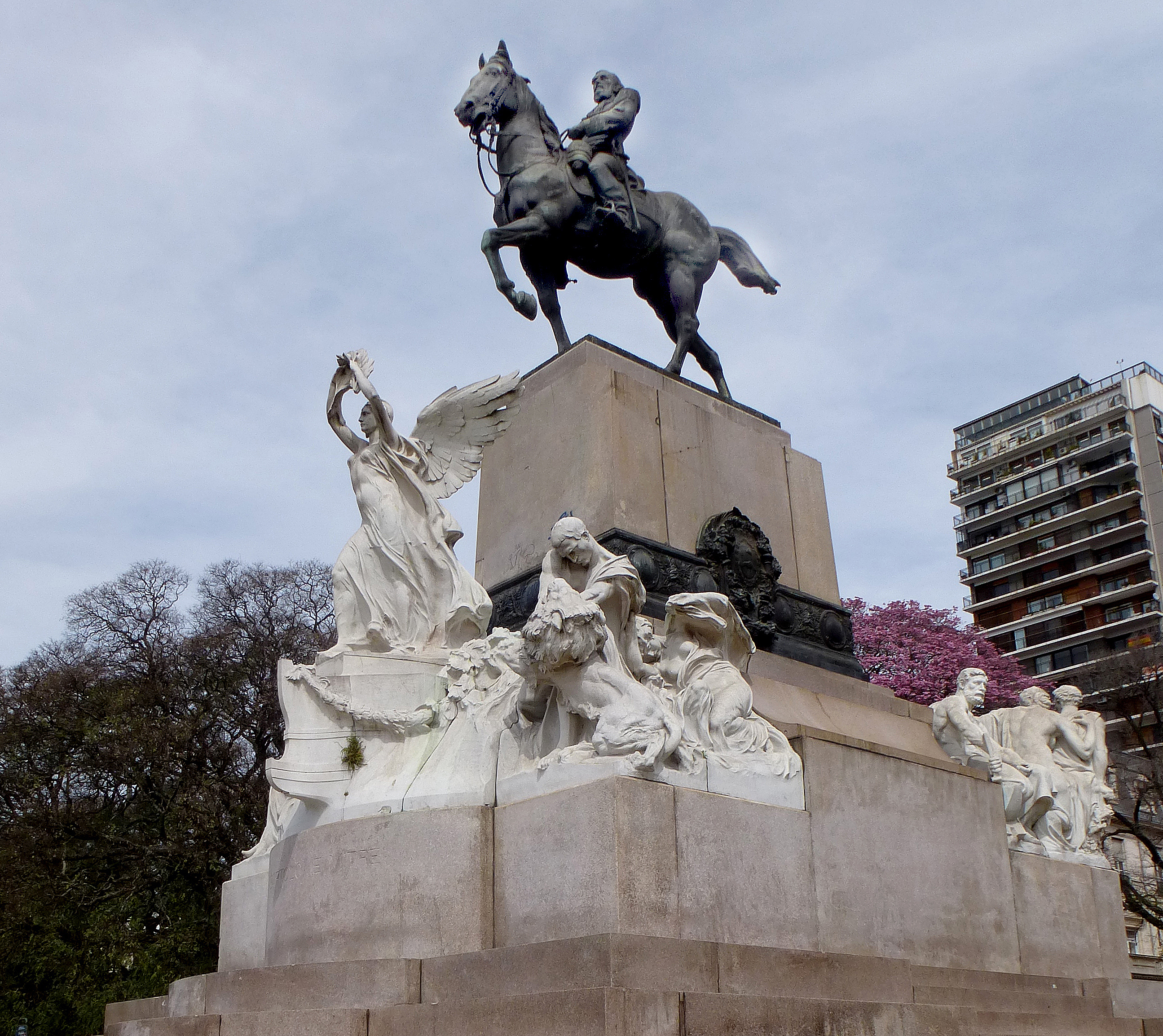 Monumento a Bartolomé Mitre